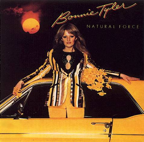 Bonnie Tyler - Natural Force című albumának borítója (2009)